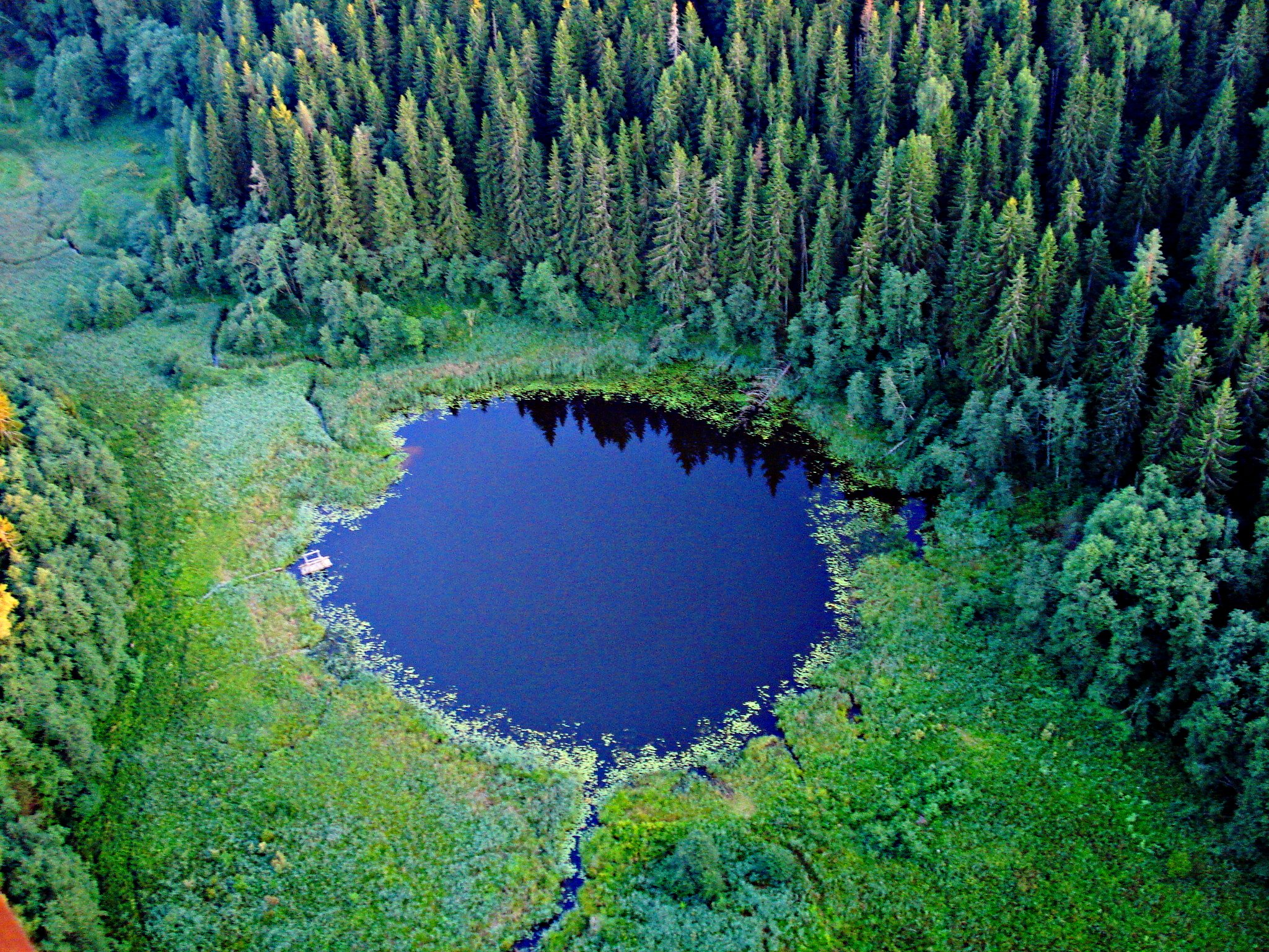 Väike Kõrbjärv asub Haanja kõrgustikul Võrumaal. On ühenduses Iskna jõe kaudu Kavadi järvega Uue-Saaluses